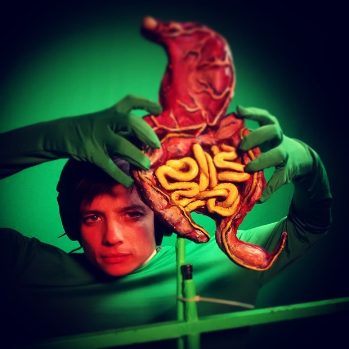 Préparation pour le film A Little Craving par Frances Adair Mckenzie